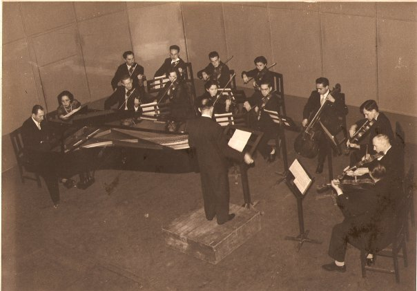 Tercer Concierto del Conjunto de Camara en el Teatro Concepción el 2 de Julio de 1953. En 1958 se incorporó a la Universidad de Concepción. Concierto en Fa menor de J.S. Bach para piano y orquesta. Solista Roberto Ide. Dresler, Carrillo y Arroyo en violines entre otros.